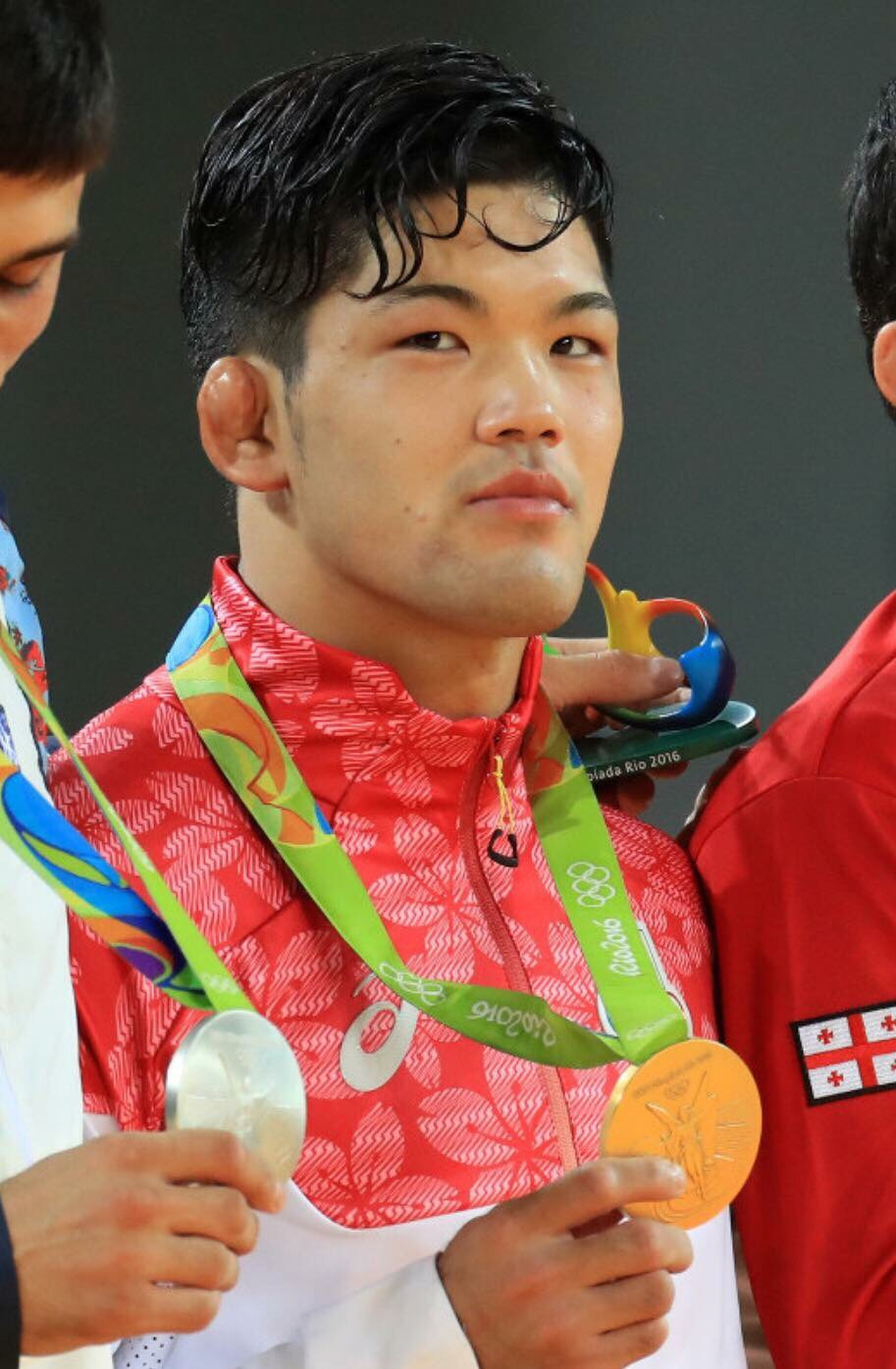 2016年リオオリンピックの表彰式にて 大野将平